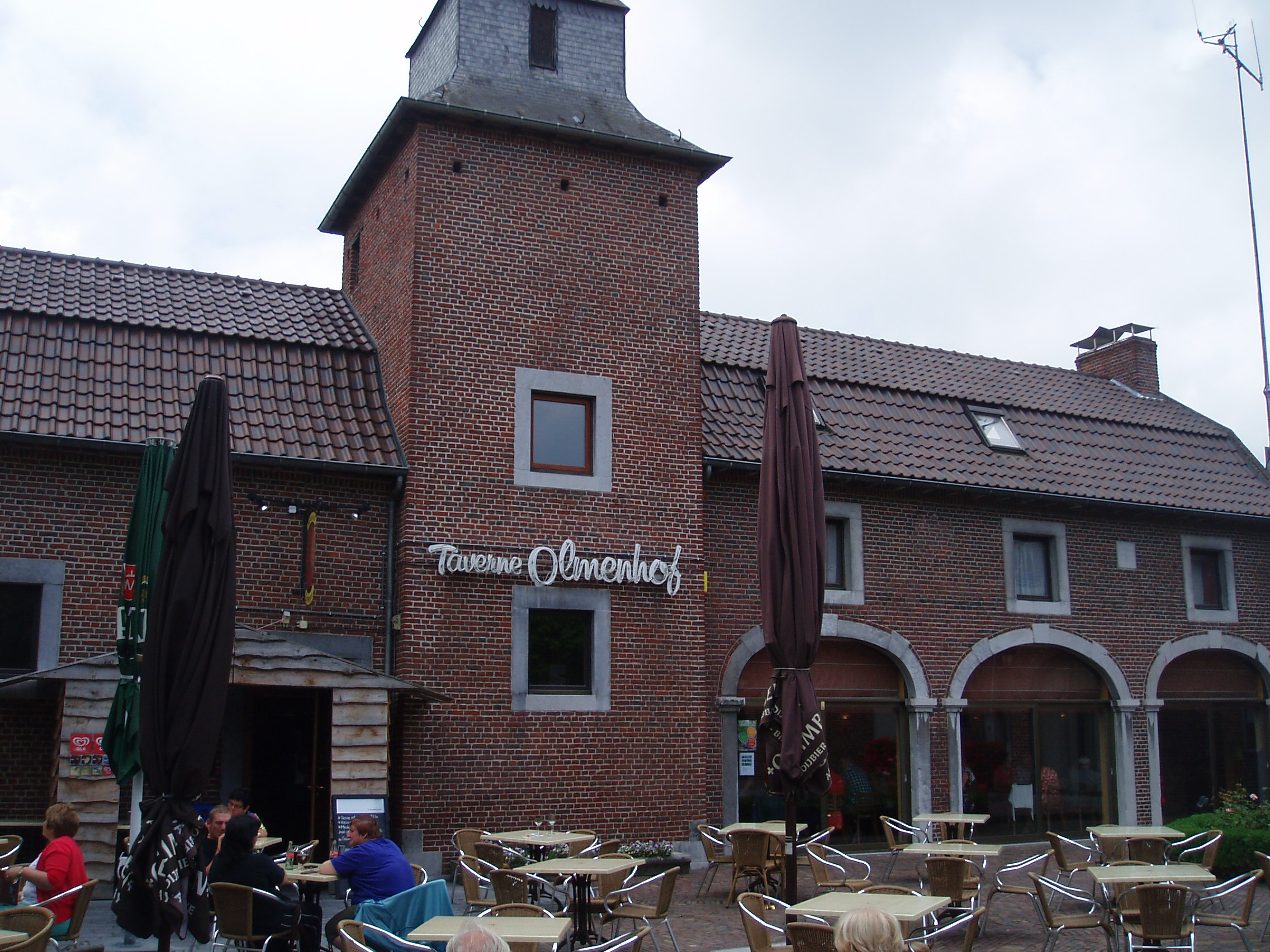 Kasteel de Pierpont - koetshuis 2013